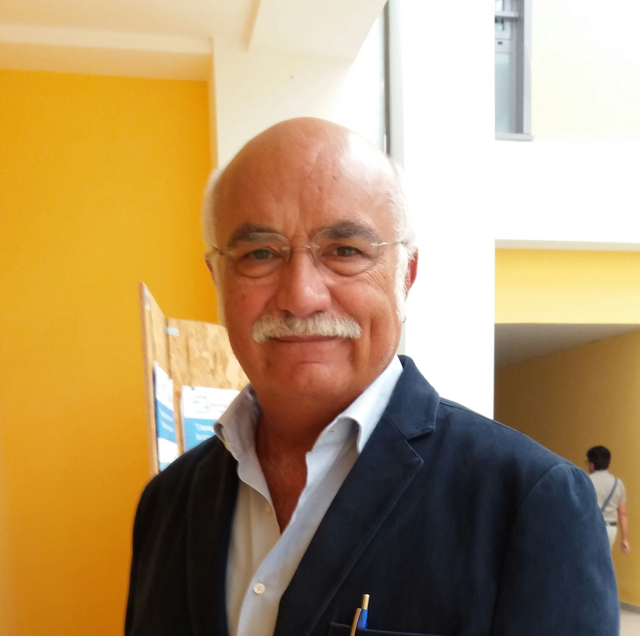 Matteo Pizzigallo (Martina Franca, 17 luglio 1950 – Roma, 19 luglio 2018) è stato uno scrittore, saggista e accademico italiano.